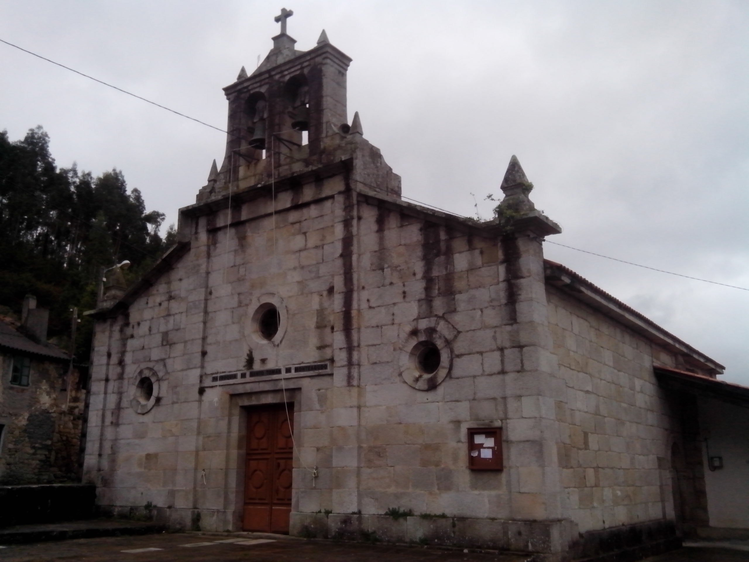 Portada da igrexa parroquial de Santo Tomé de Monteagudo, concello de Arteixo.